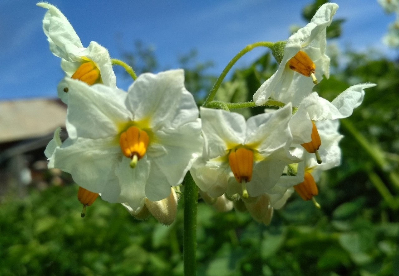 Potato flower close-up. Eastern Siberia